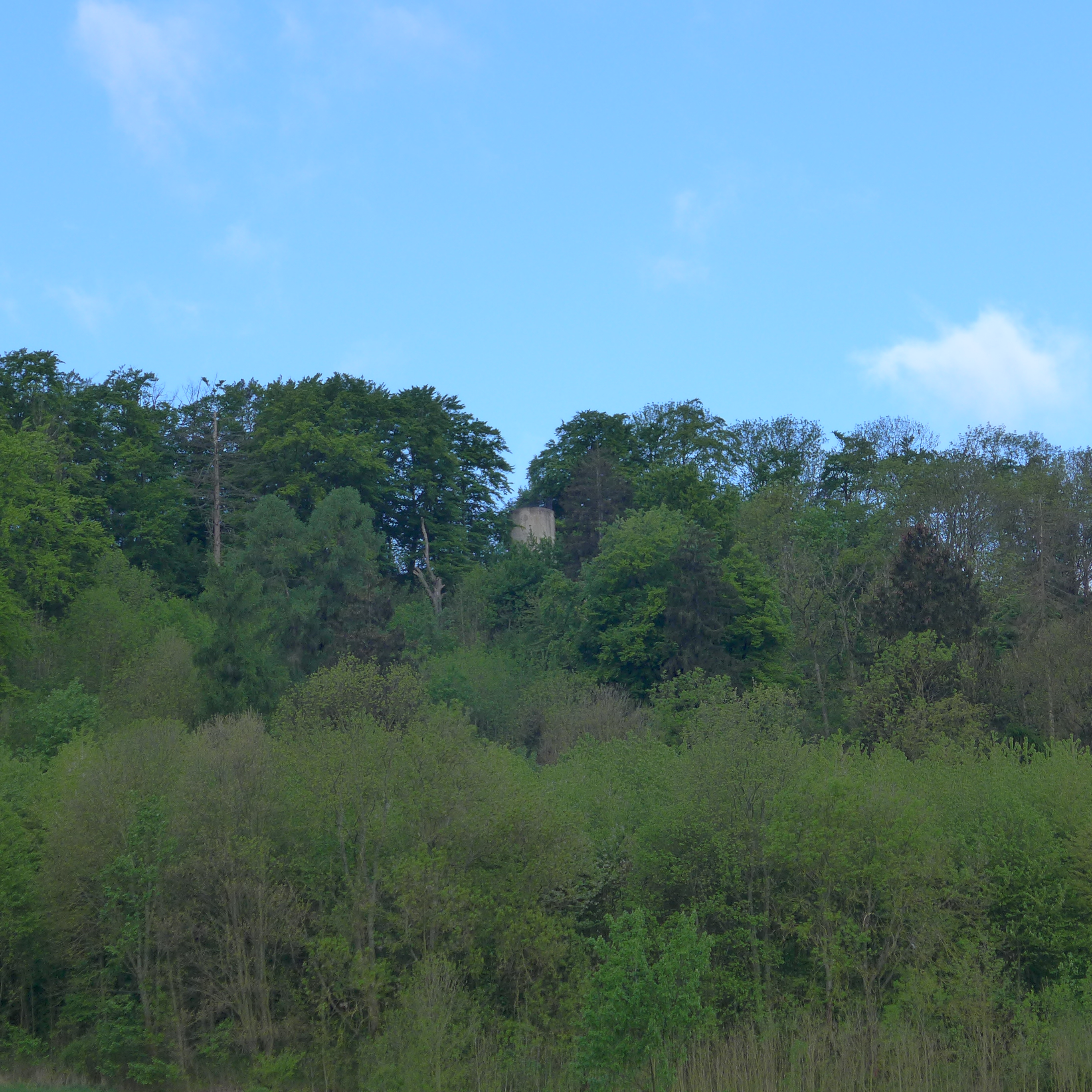 von Osten gesehen